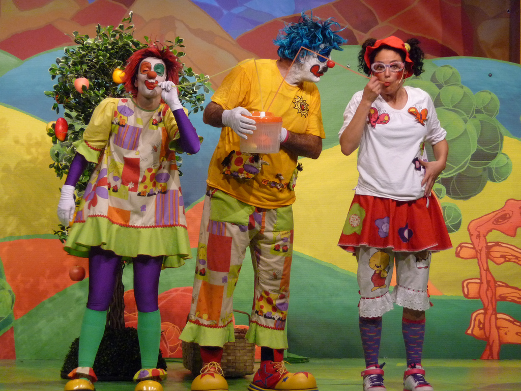 Pirritx, Porrotx eta MariMotots